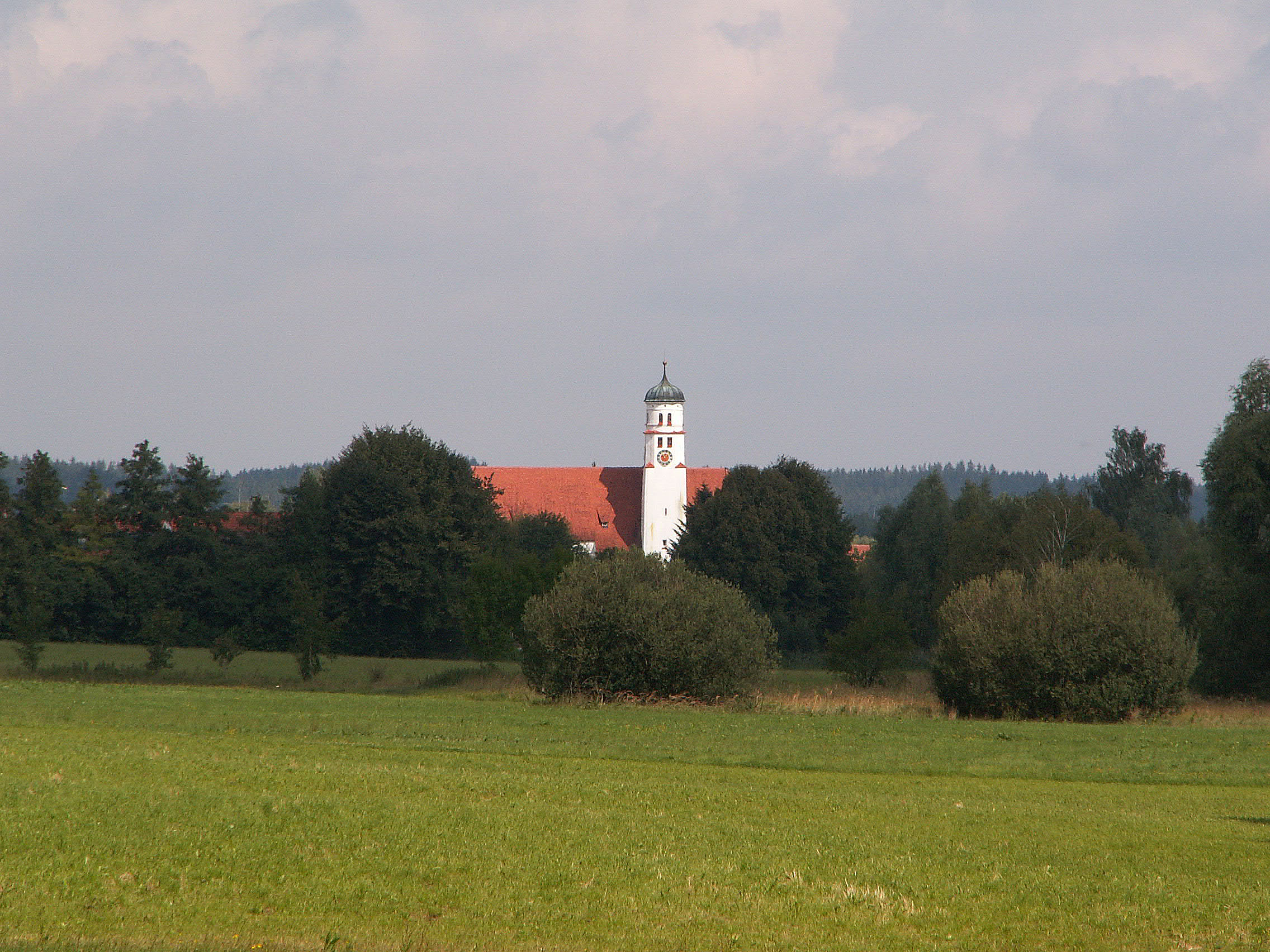 Behlingen, Kammeltal